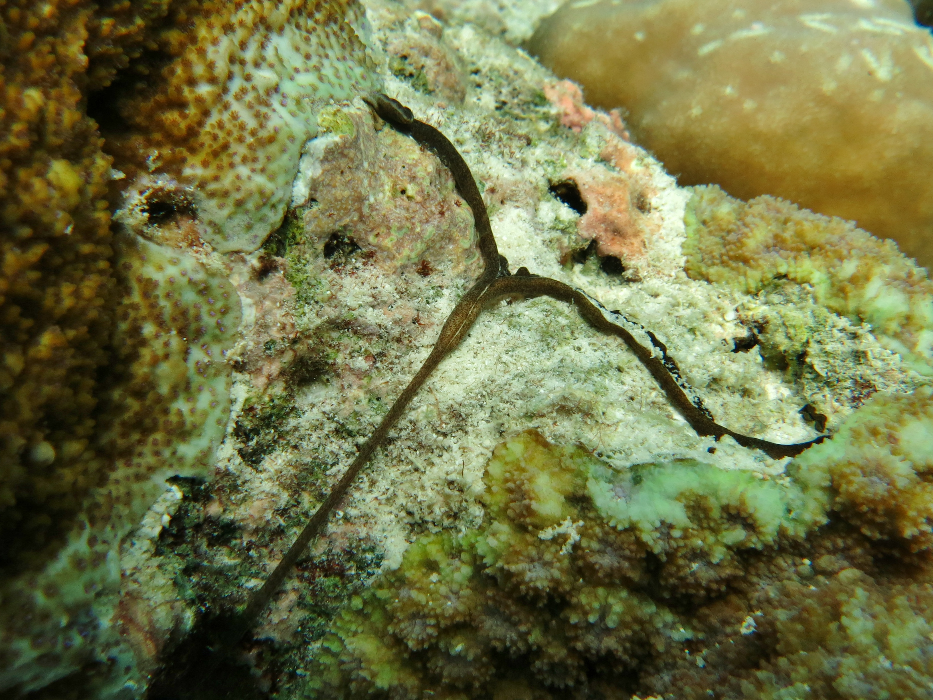 Un ver échiurien (Achaetobonellia maculata ?) aux Maldives (Thiladhoo, atoll de Baa).